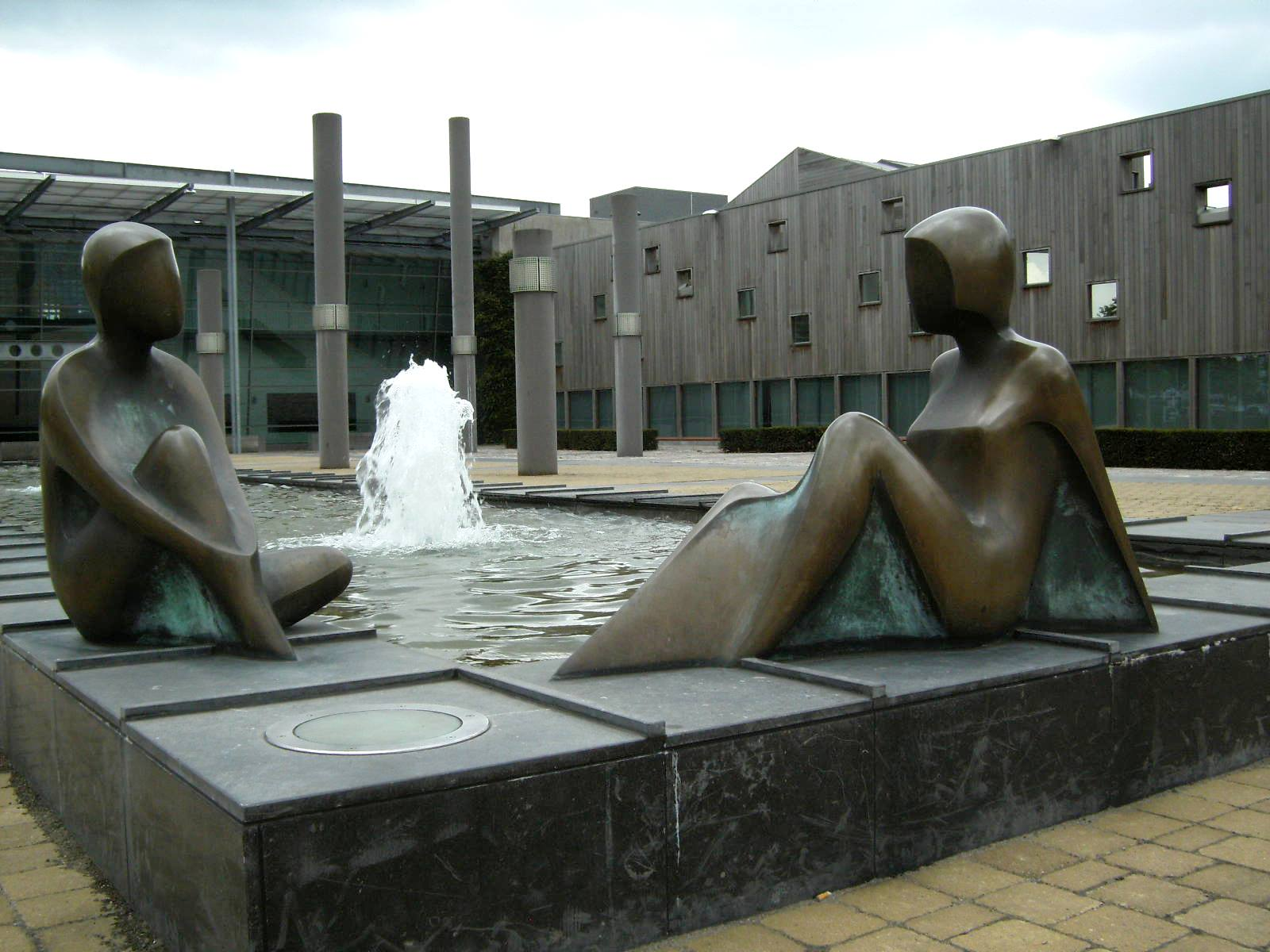 'Brunnengespräch' (gesprek aan een bron) van Loni Kreuder. Op het plein bij de hoofdingang van de Nedap-fabriek, Groenlo, Nederland